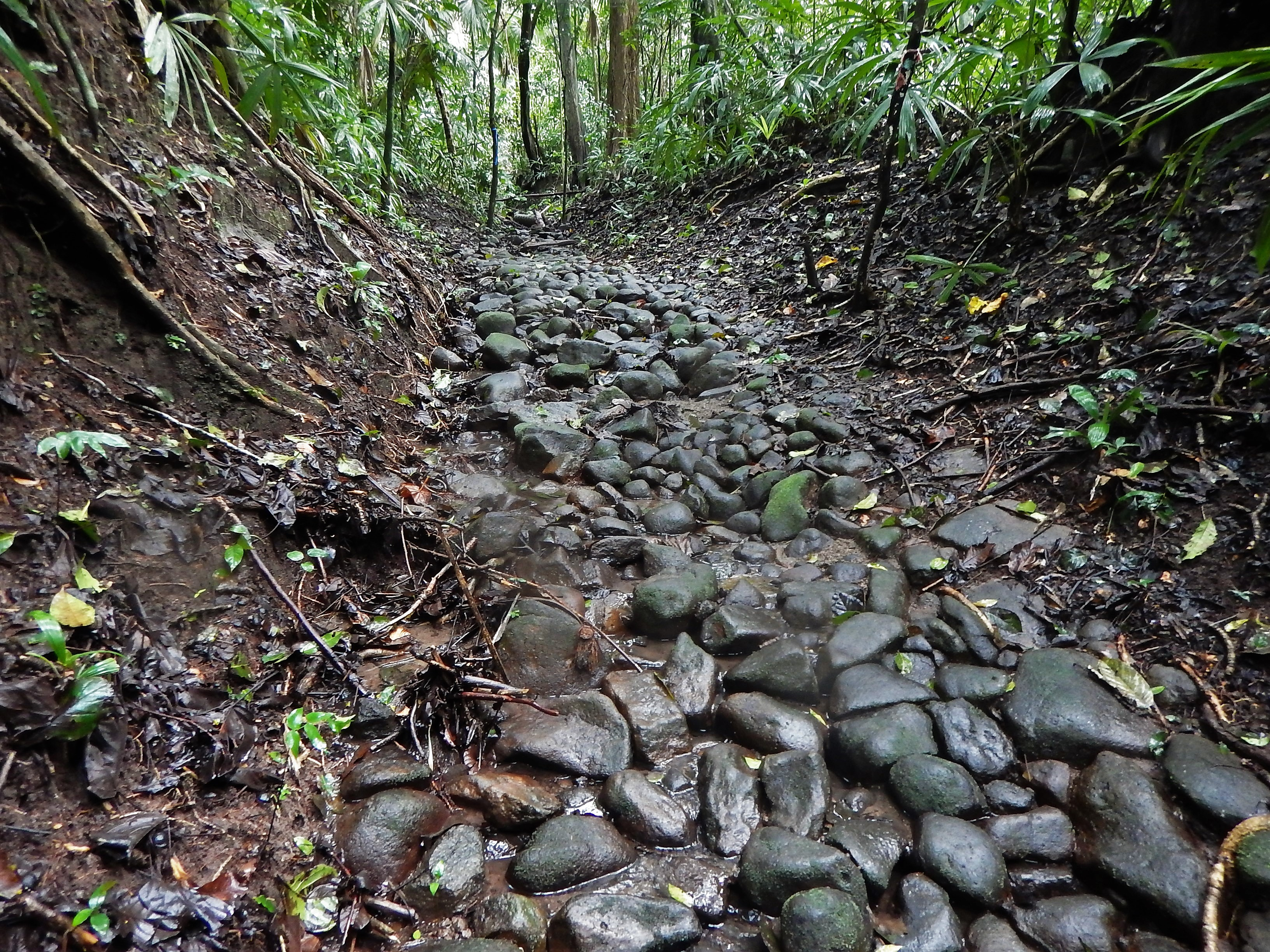 Restos de empedrado del Camino Real de Cruces, entre Venta de Cruces y la Avenida Madden. Panamá